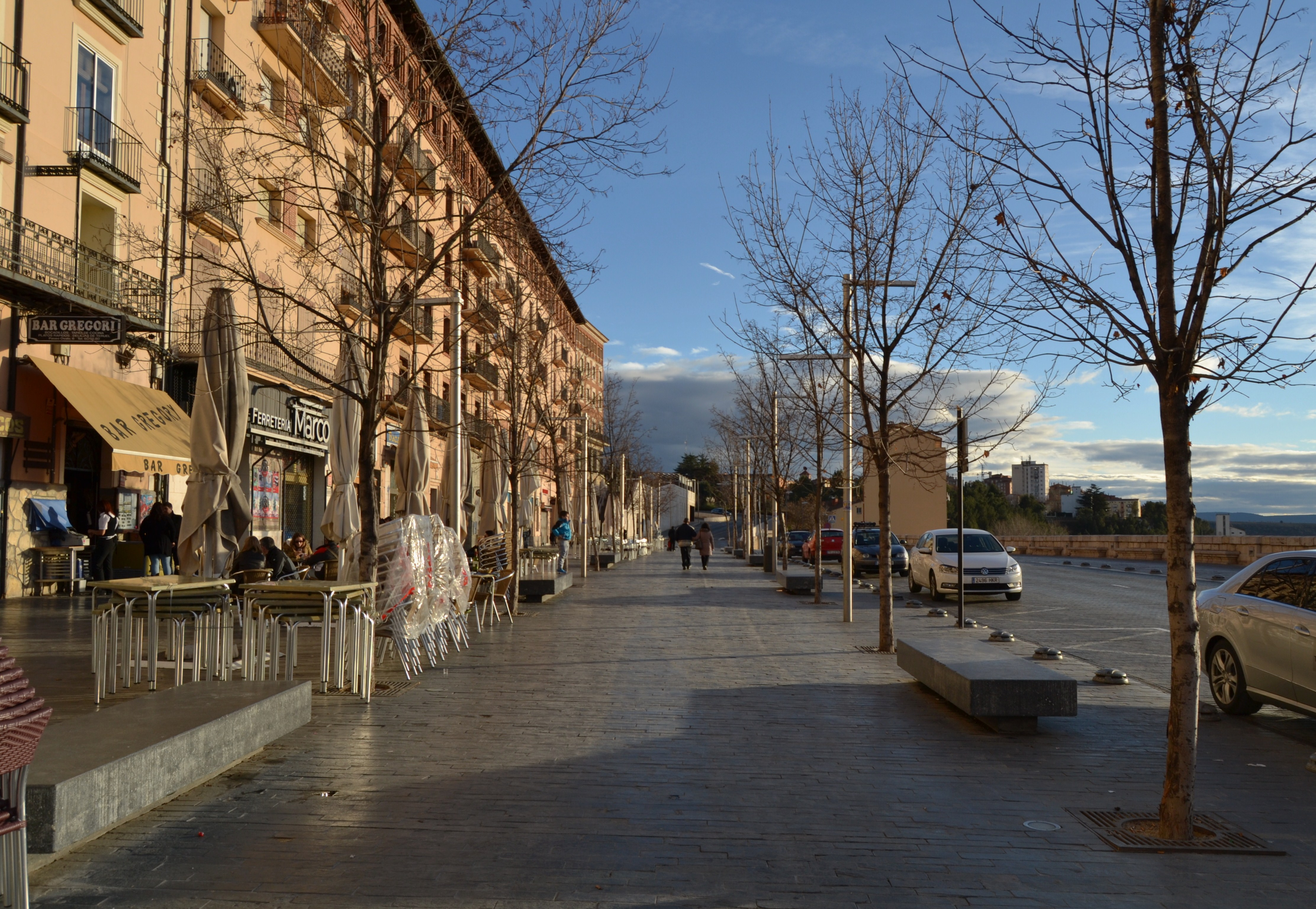 Passeig del Óvalo, Terol.